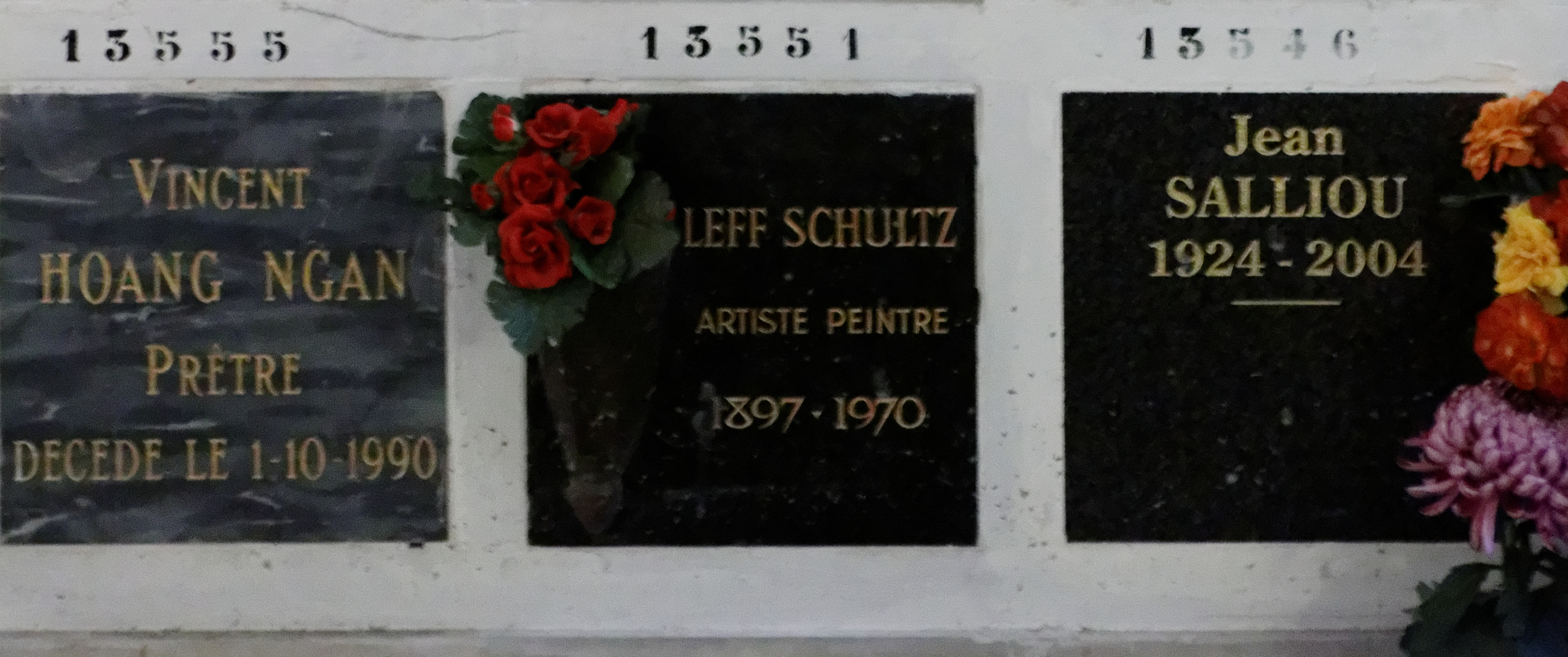 Cases du columbarium du cimetière du Père-Lachaise.